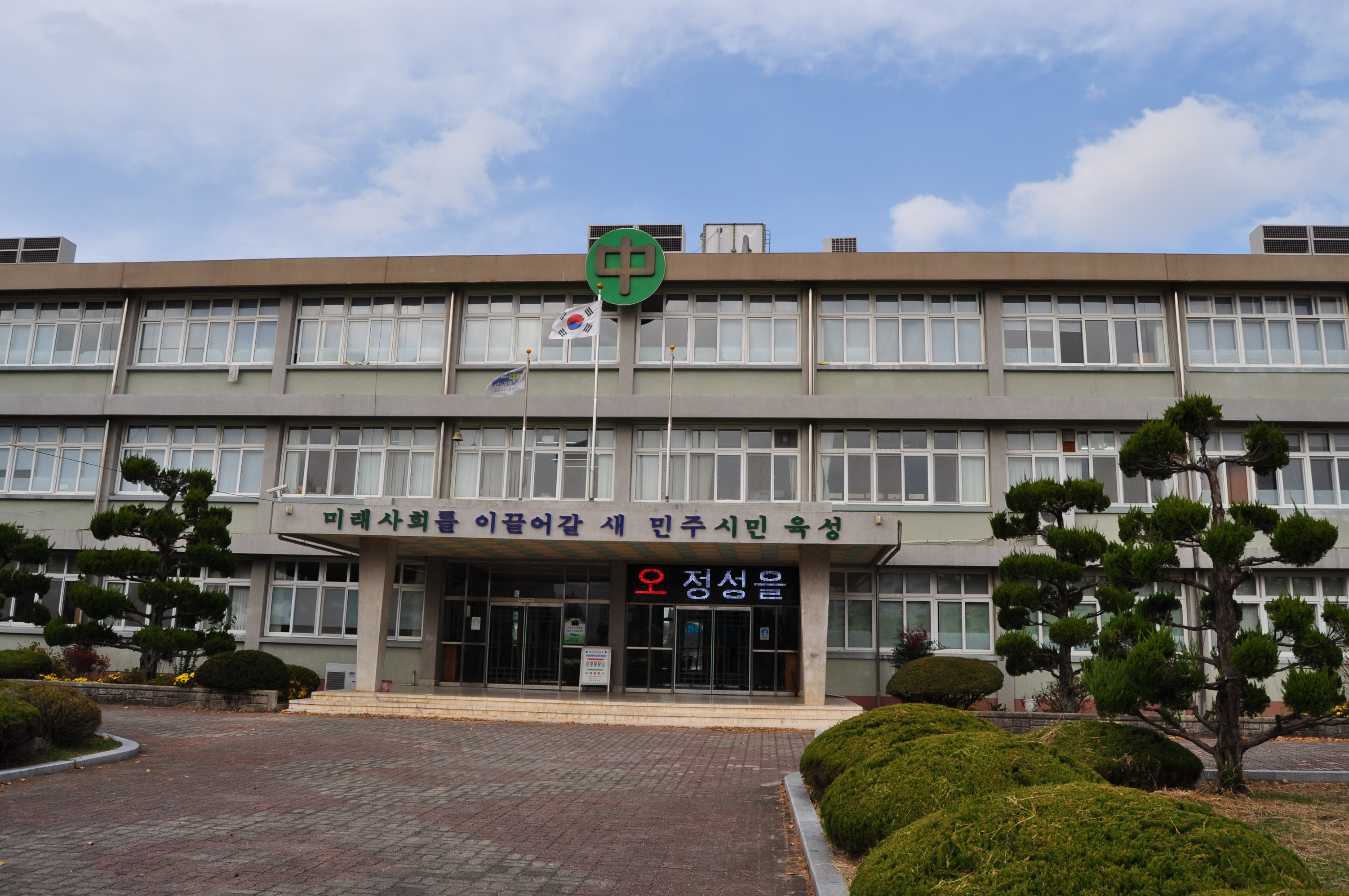 함양중학교 본관 정문